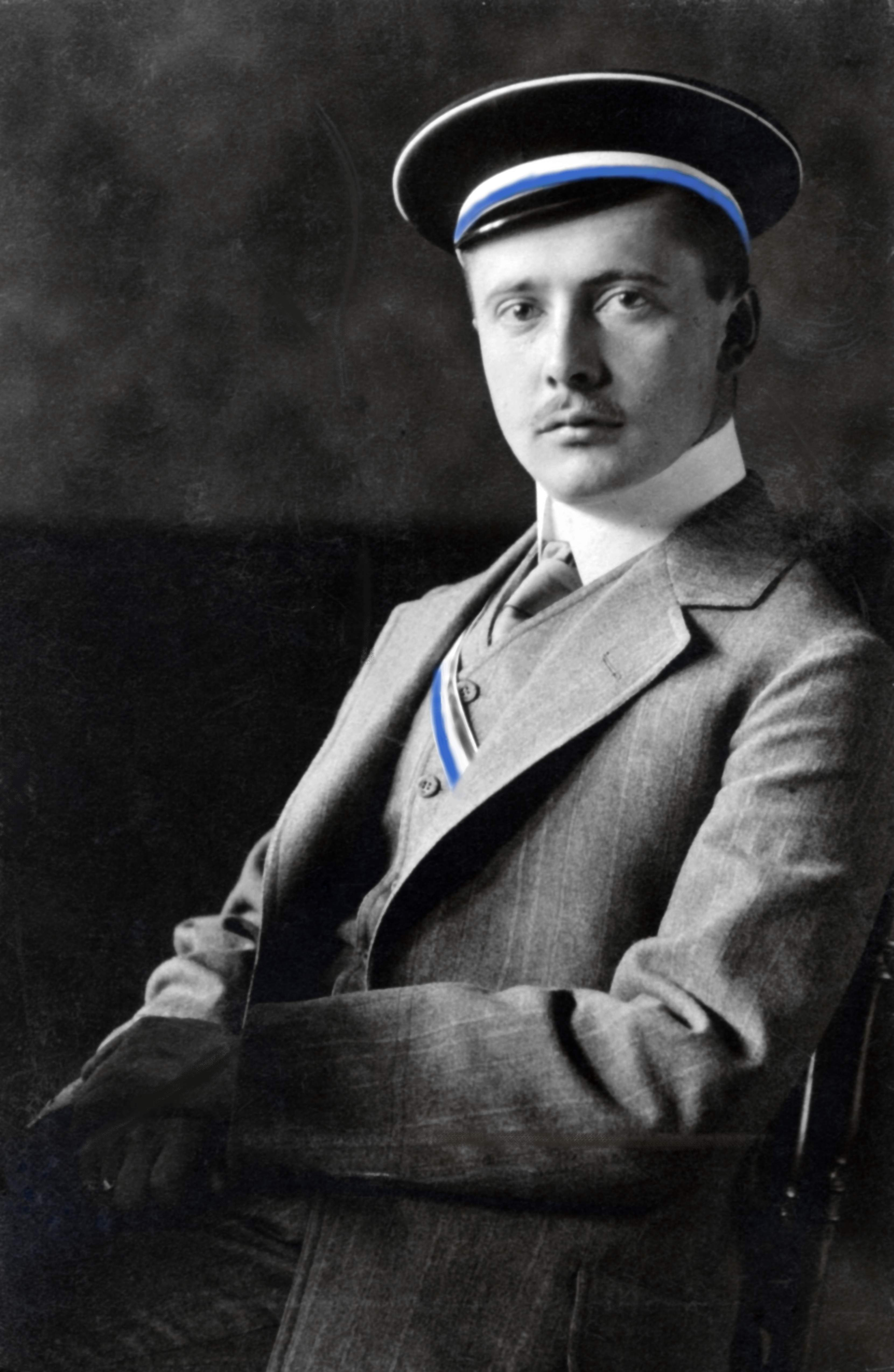 Fotografie von Conrad Prange